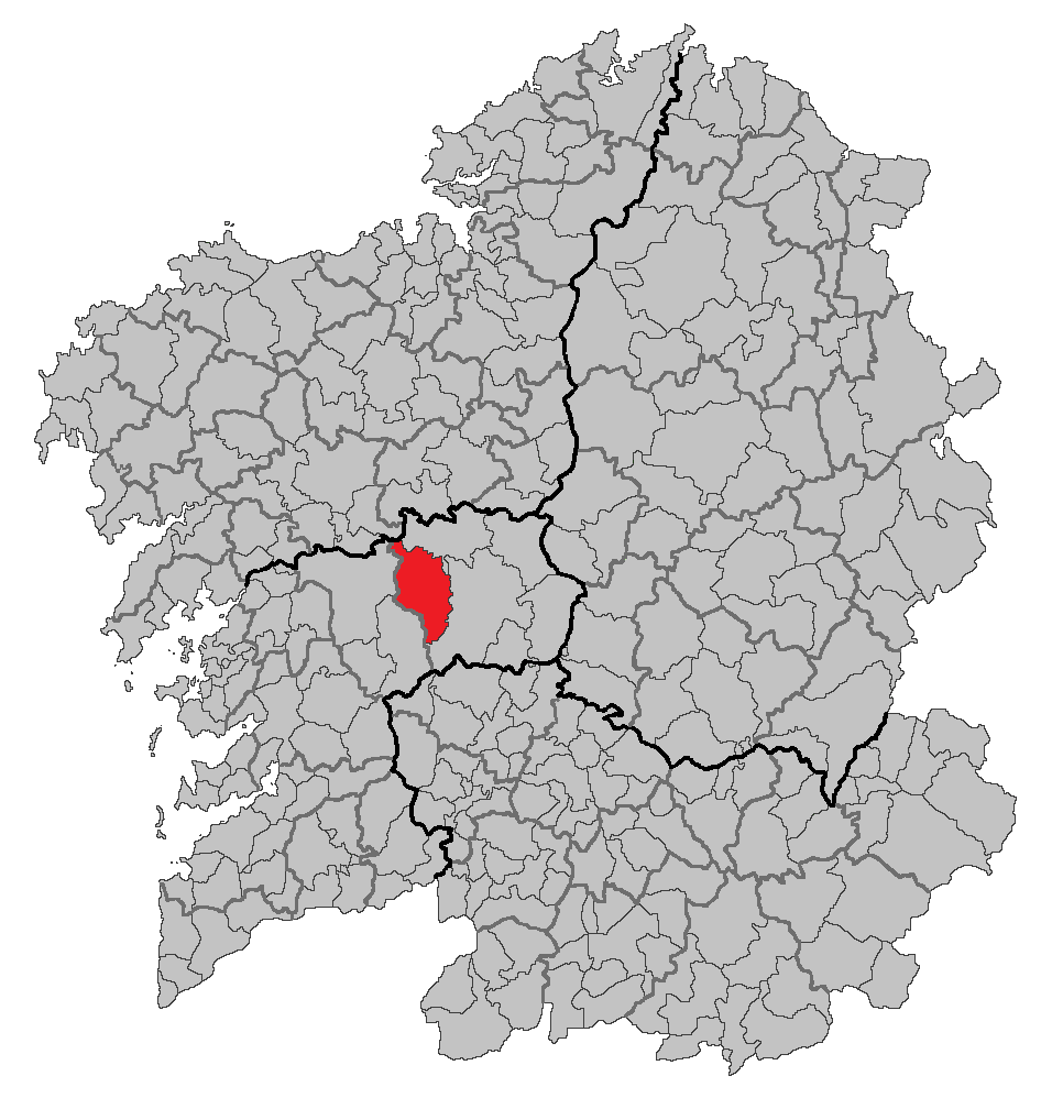 Mapa coa localización do concello de Silleda.